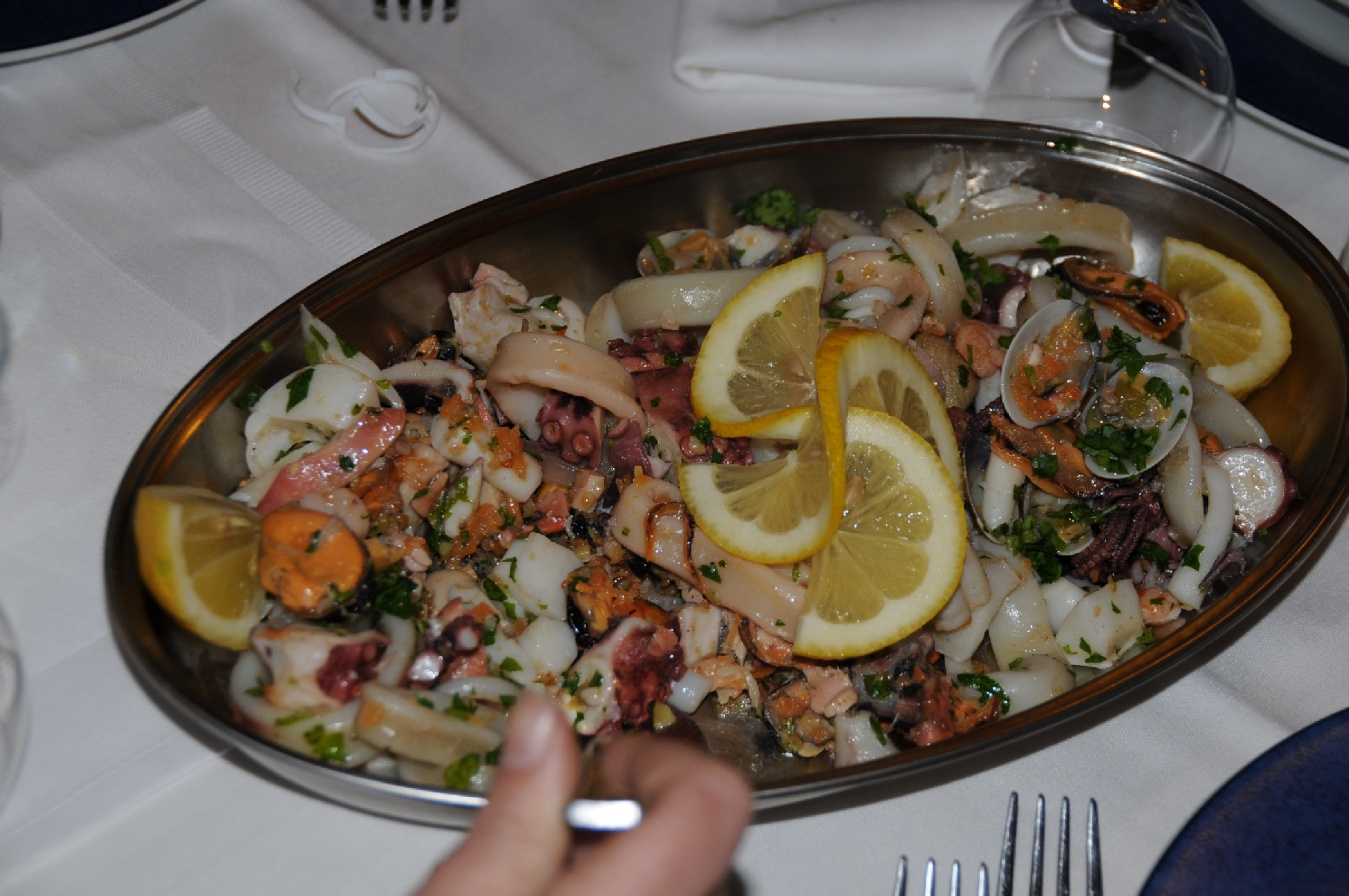 Insalata di mare Wikimangia 4 - Castel del Piano